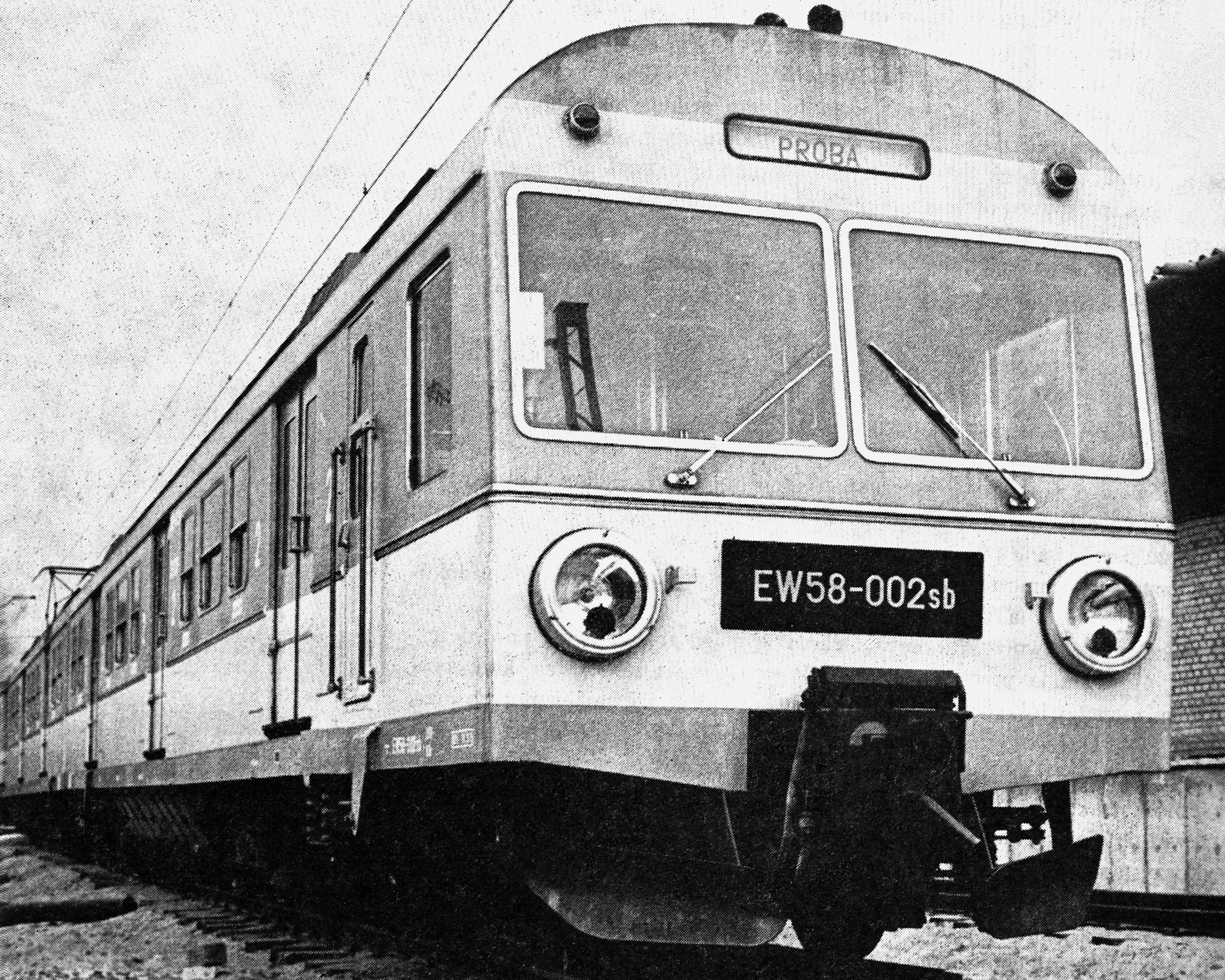 Elektryczny zespół trakcyjny EW58-002 przeznaczony dla Szybkiej Kolei Miejskiej w Trójmieście stoi przed lub po jeździe próbnej na torze wjazdowym na teren ówczesnego Centralnego Ośrodka Badań i Rozwoju Techniki Kolejnictwa na warszawskim Grochowie.